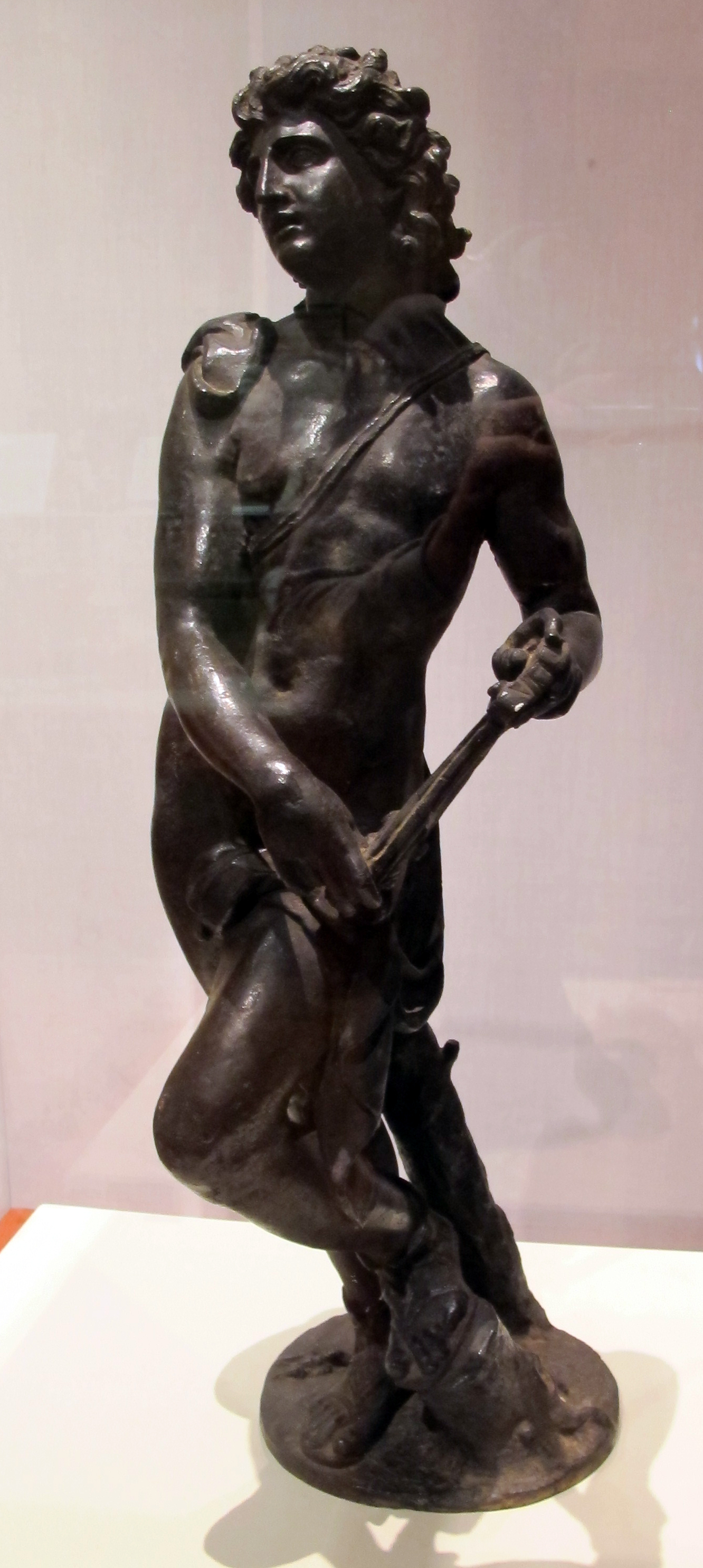 Palazzo Bonacossi This is a photo of a monument which is part of cultural heritage of Italy.